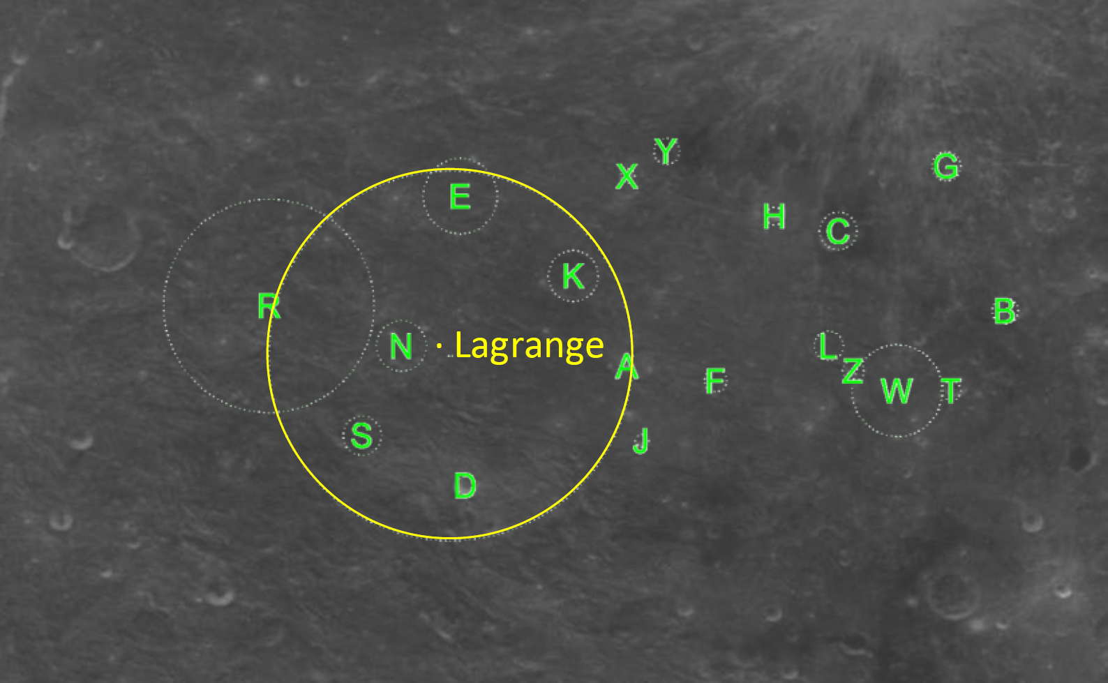 Detalle de la imagen Moonmap from clementine data del cráter Lagrange